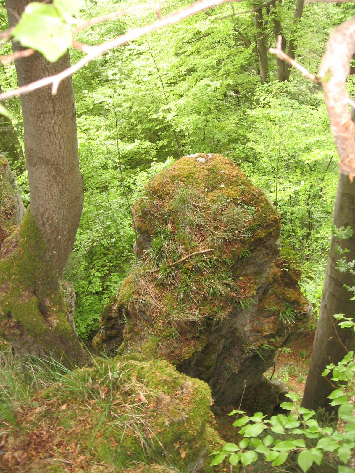 Felsen im östlichen Bereich des Naturdenkmal Felsgruppen Overlackersberg von oberhalb